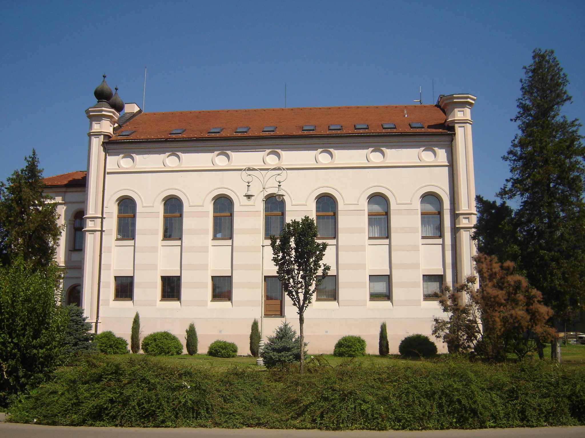 Szentesi zsinagóga hosszanti oldala, ha szemben állok a főbejárattal Pataki Márta felvétele